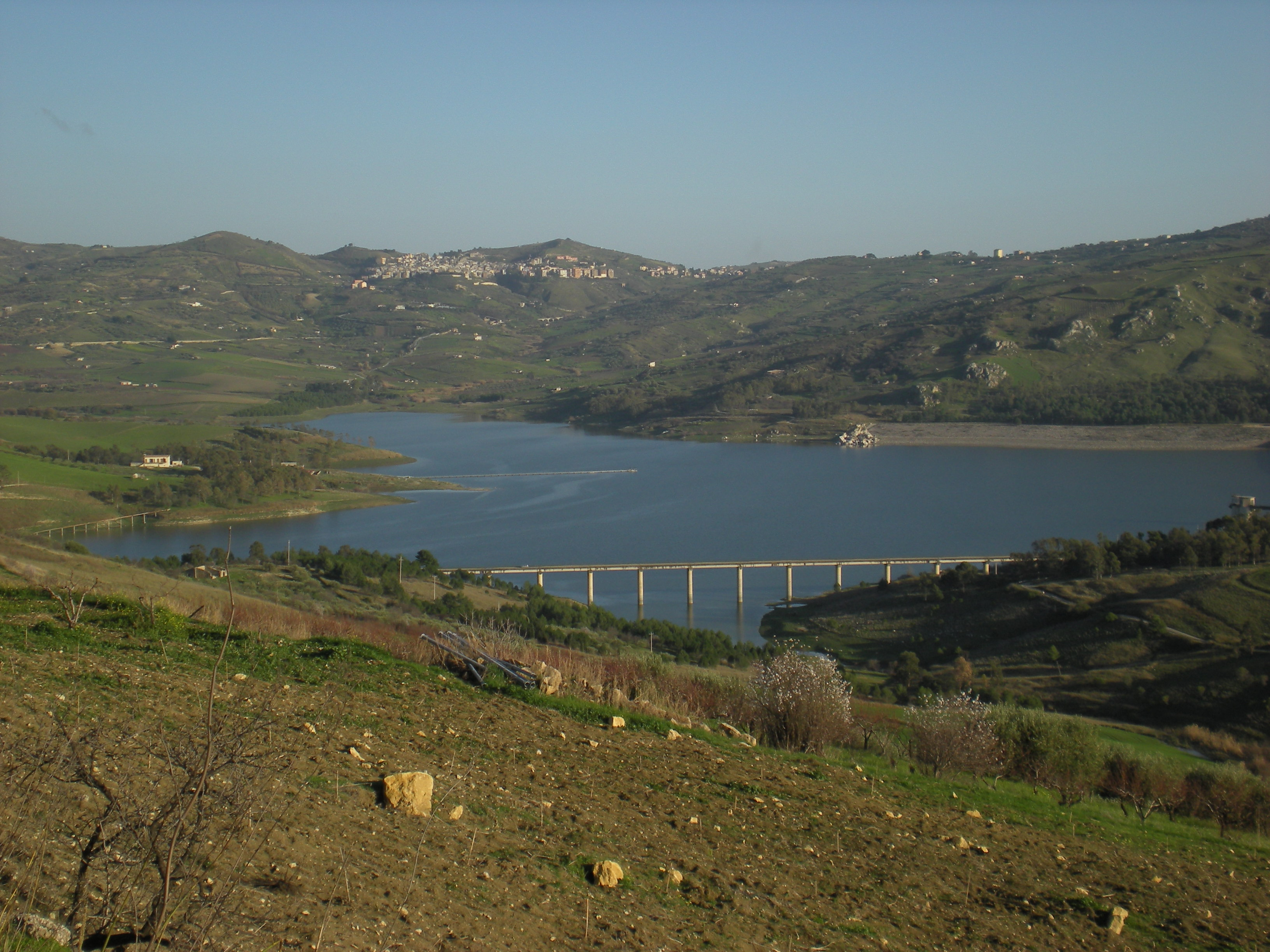 Diga Castello